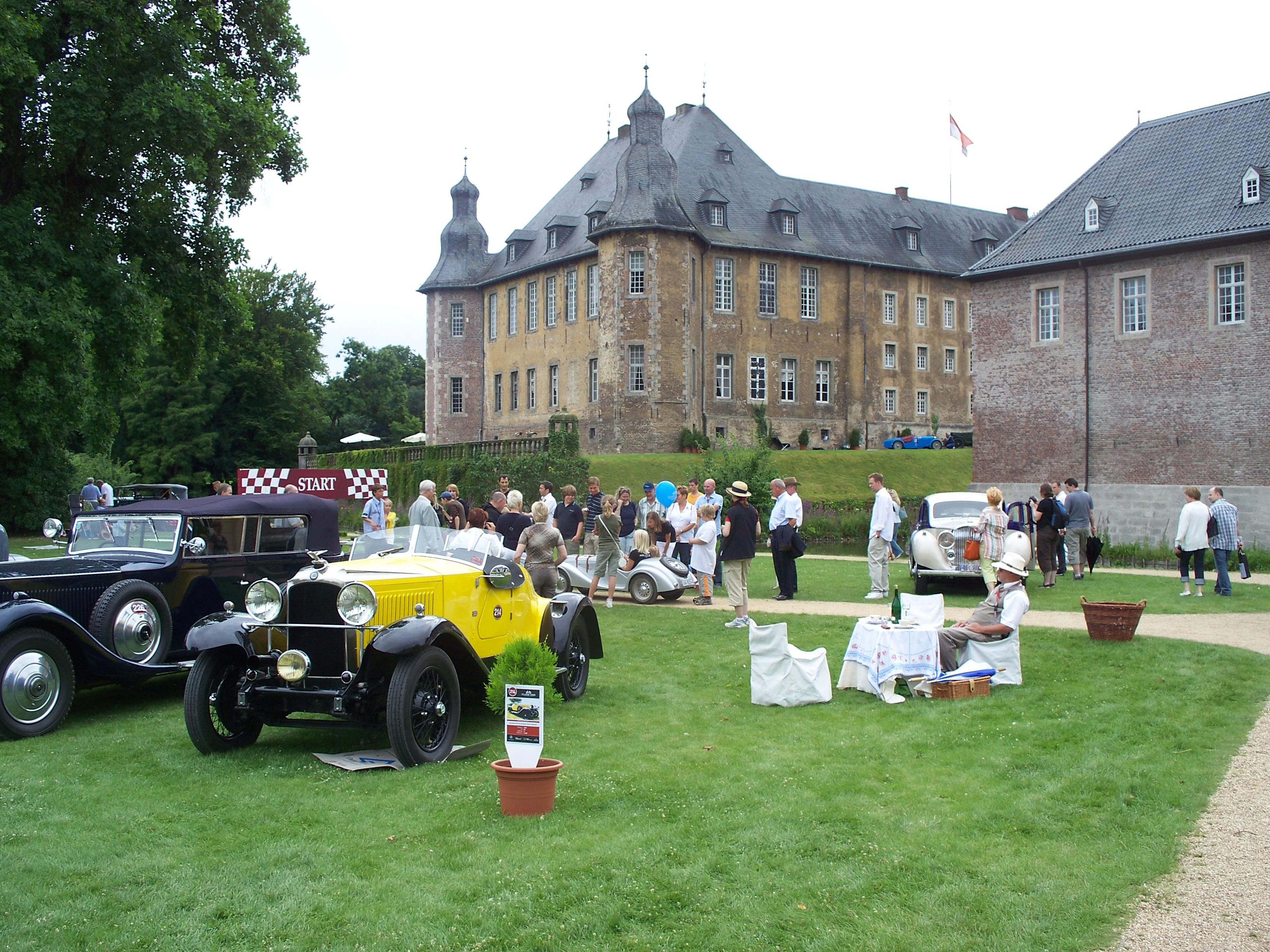 Oldtimertreffen Schloss Dyck 2008